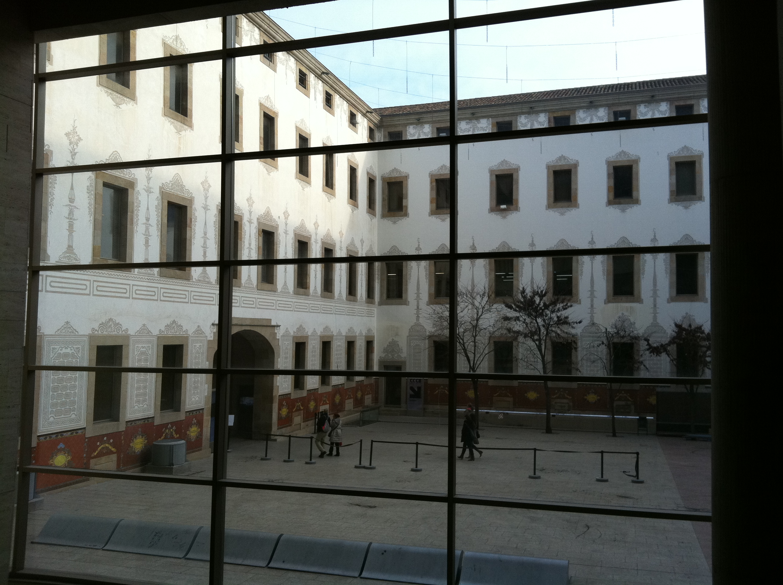 Pati de les dones vist des de l'interior del CCCB